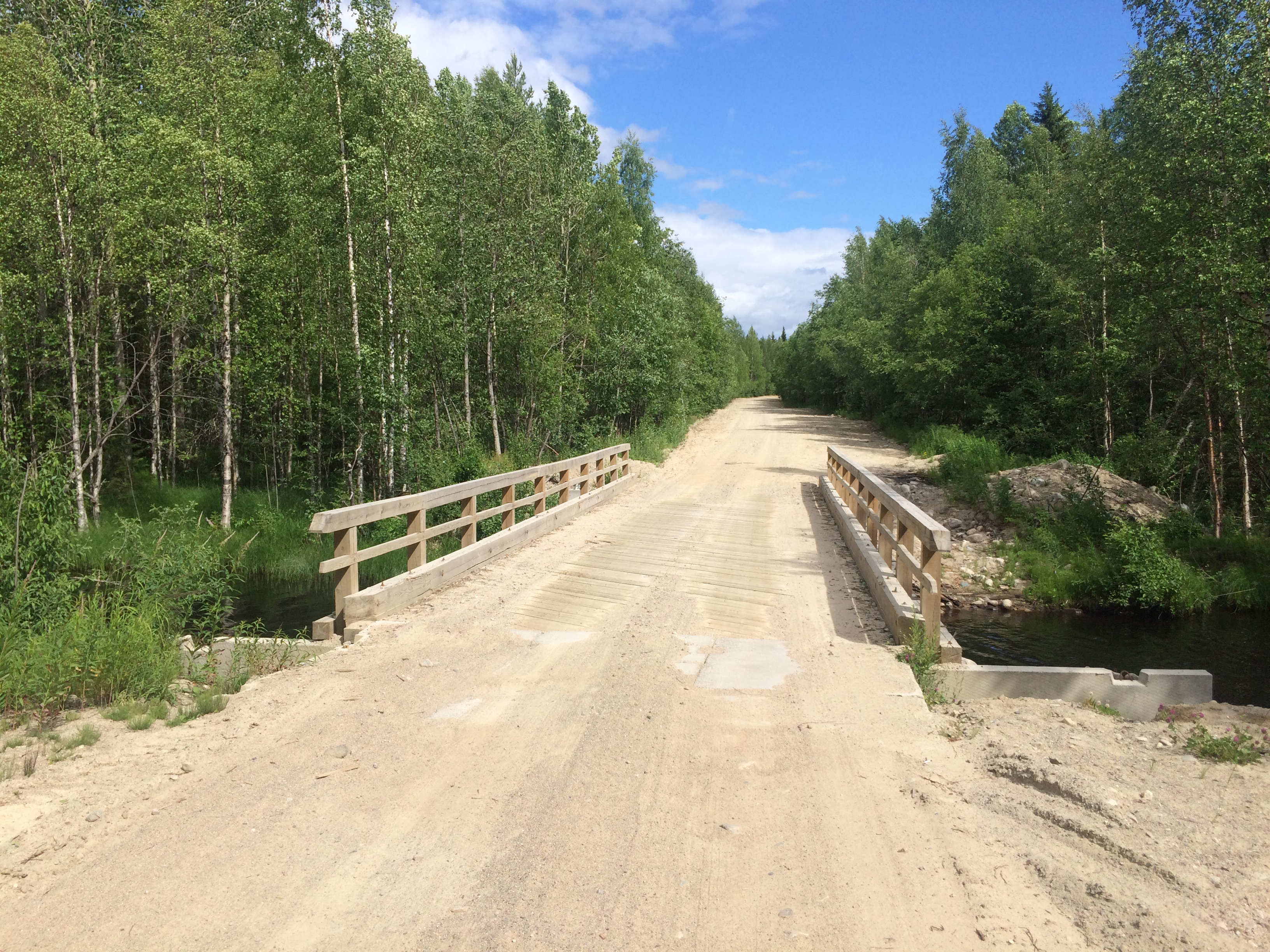 Унежма (река, впадает в Выгозеро)